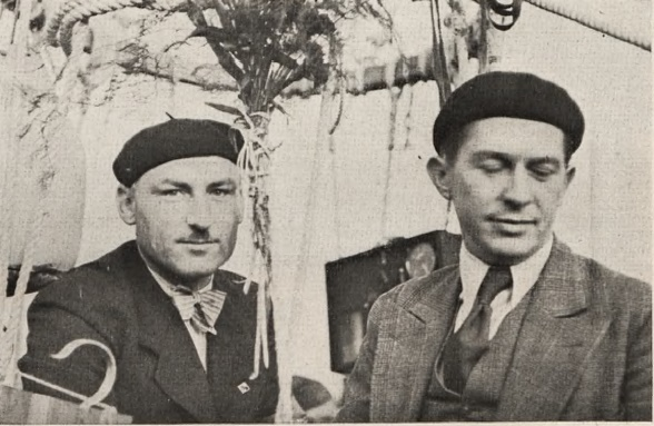 Antoni Janusz (po prawej) i Franciszek Janik